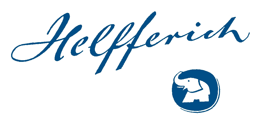 bearbeitet